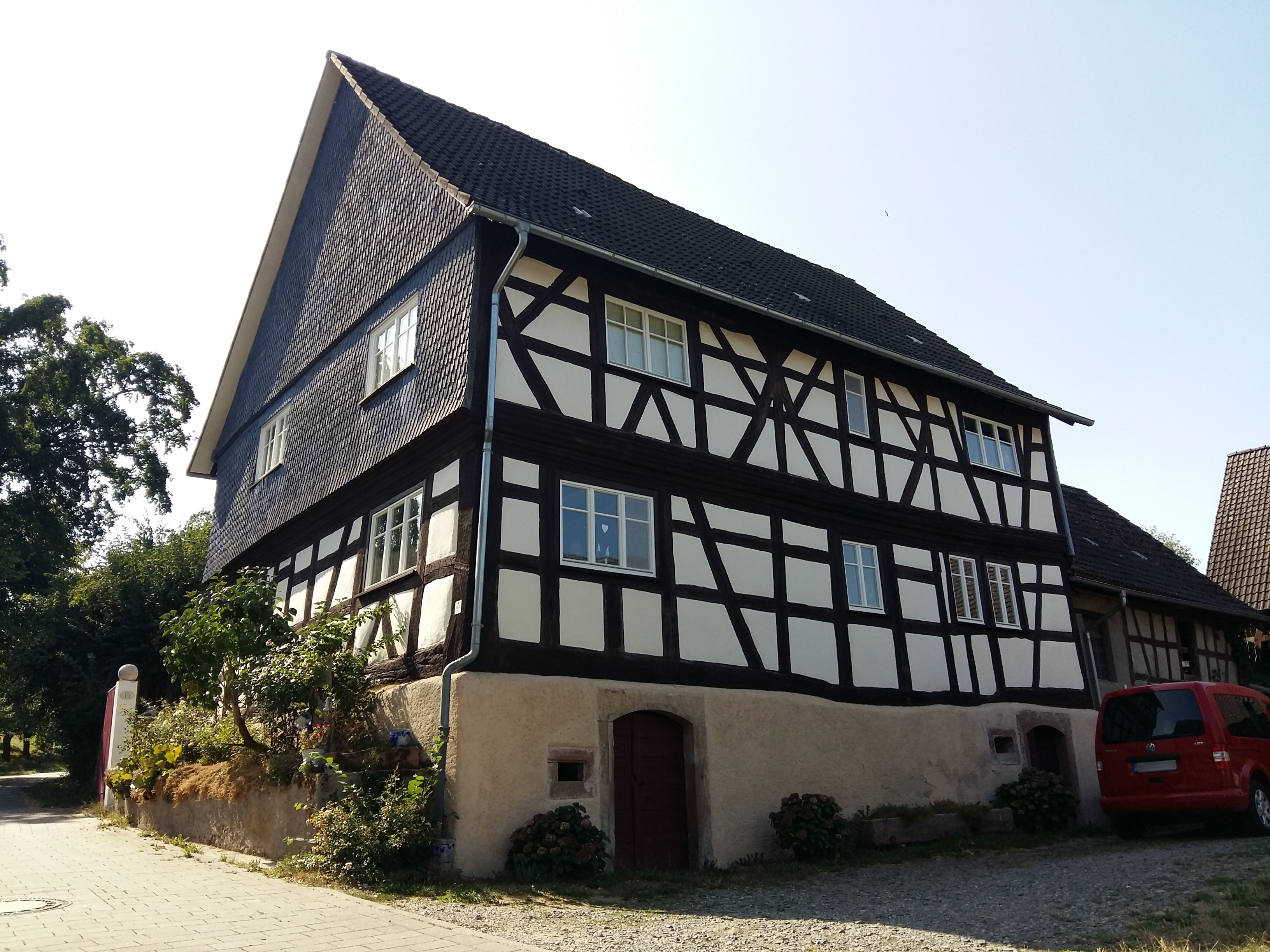 Fachwerkhaus in Herchenrode, Hausnummer 15 in Modautal (von Westen). Denkmalschutzpreis des Landkreises Darmstadt-Dieburg 2010